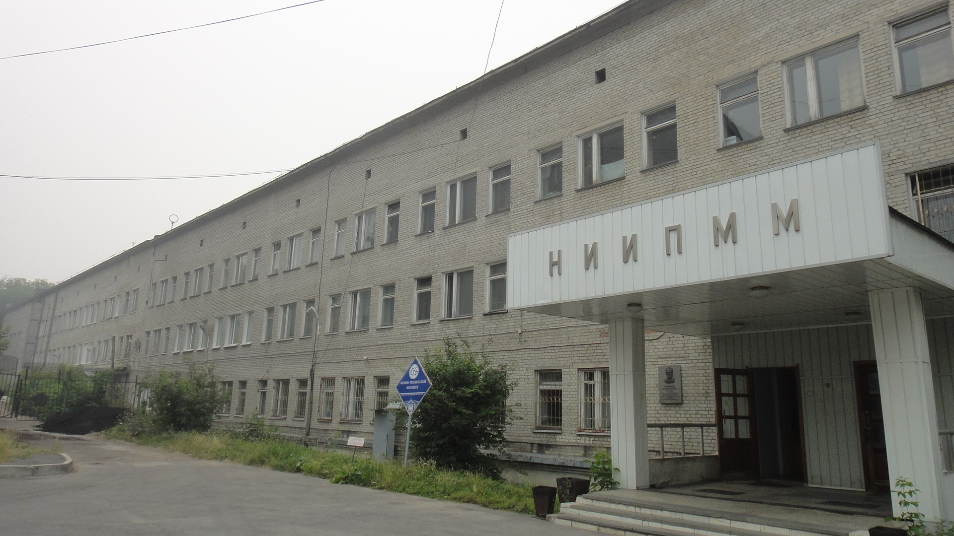 Научно-исследовательский институт прикладной математики и механики ТГУ